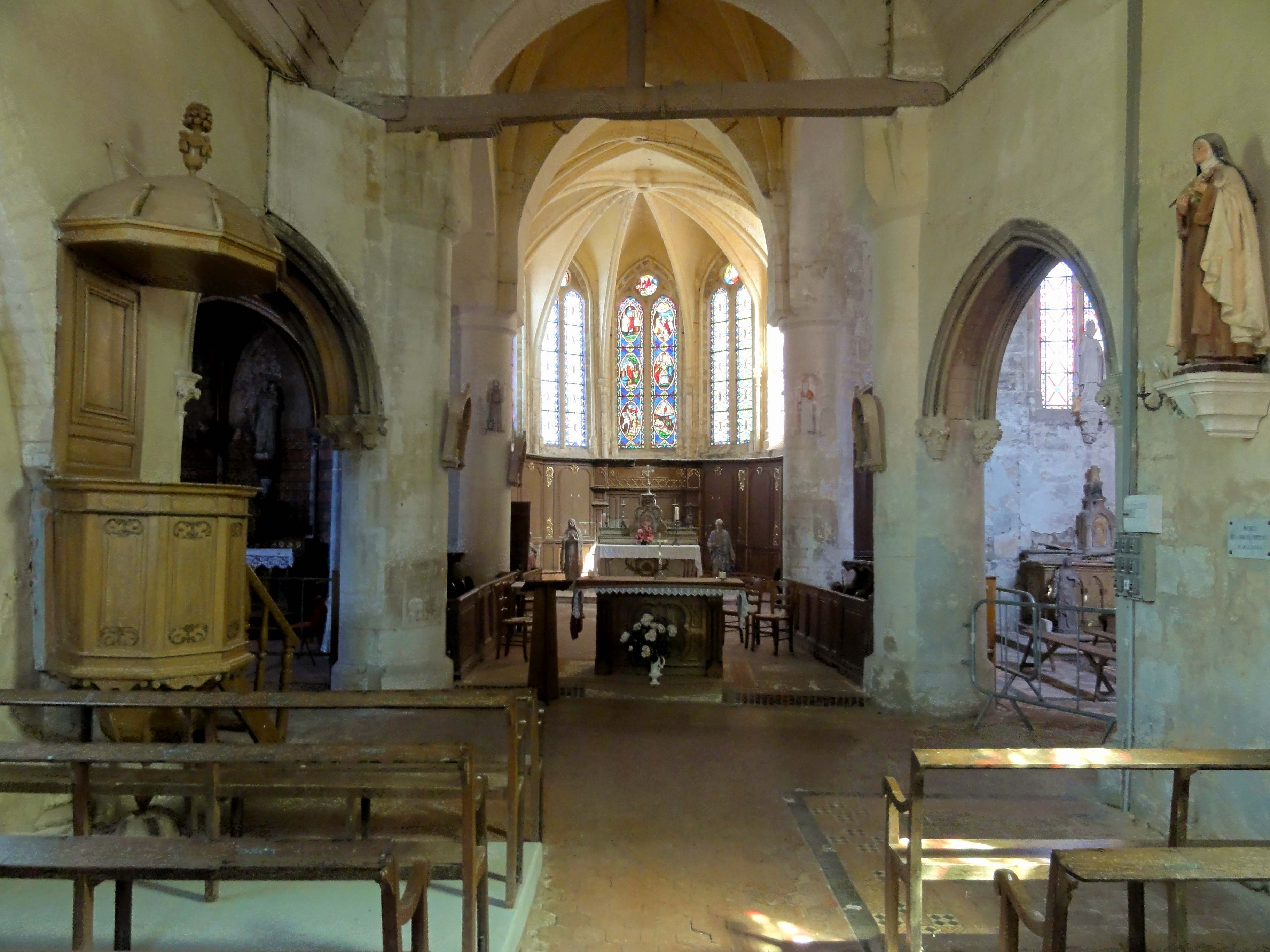 Intérieur de l'église (voir titre).